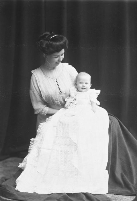 Foto. Studioportret van Kitty Westerman met haar pasgeboren dochter Antoinette in doopjurk